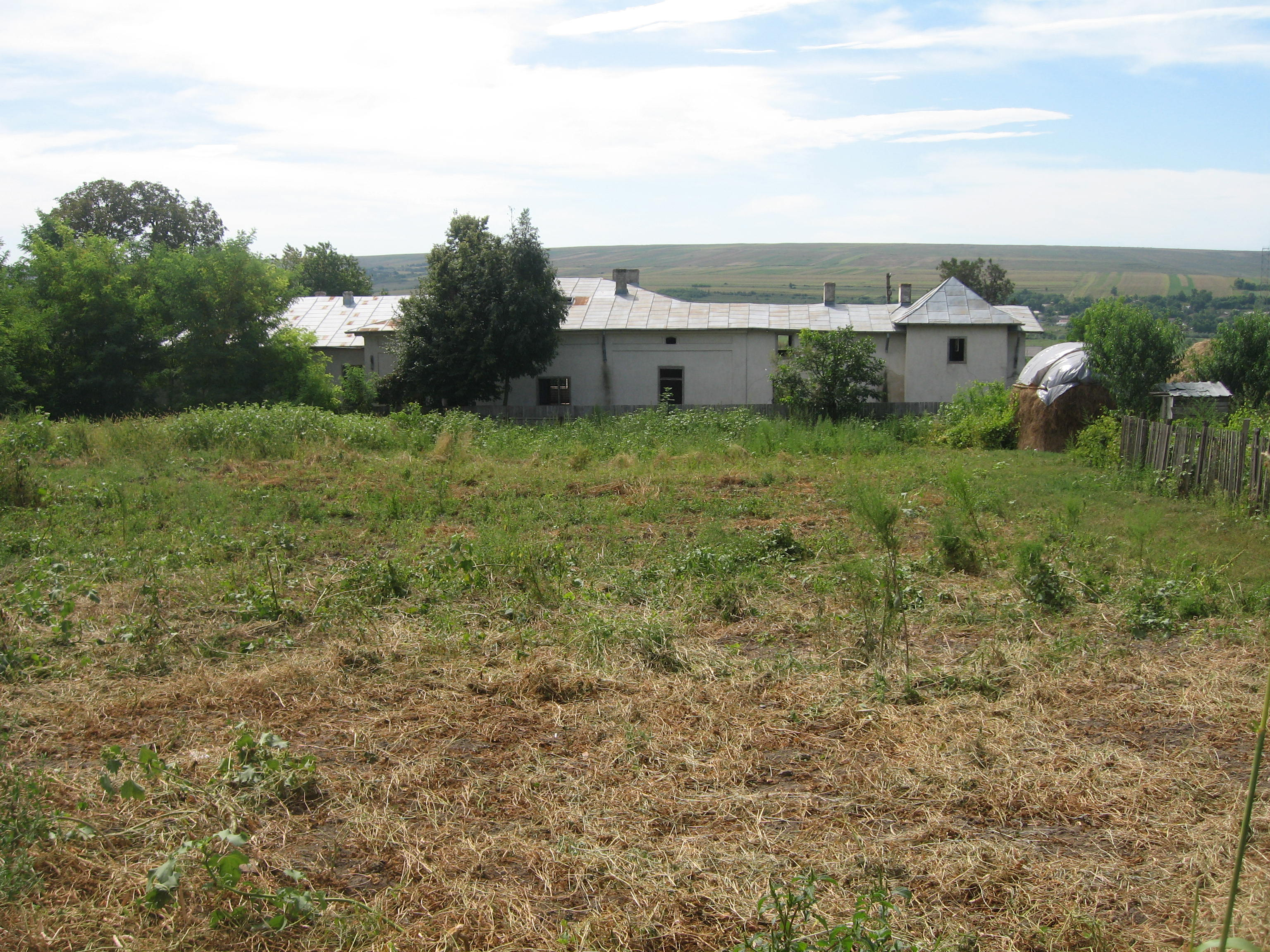 Conacul din Dângeni, Botoșani County, Romania